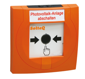 Handmeldezentrale Für Brandfallabschaltung, Hersteller: SolteQ GmbH